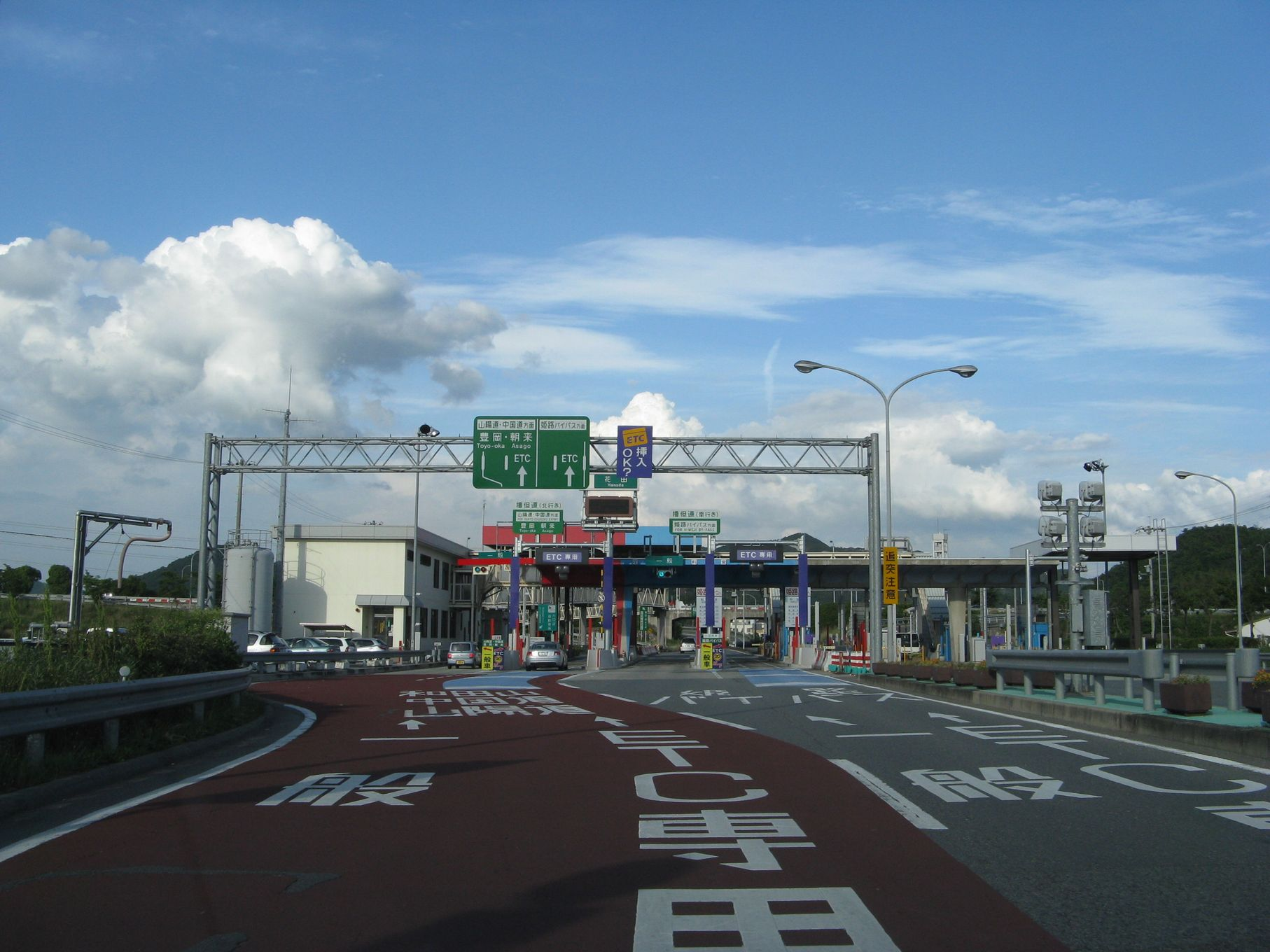 播但連絡道路 花田インターチェンジ